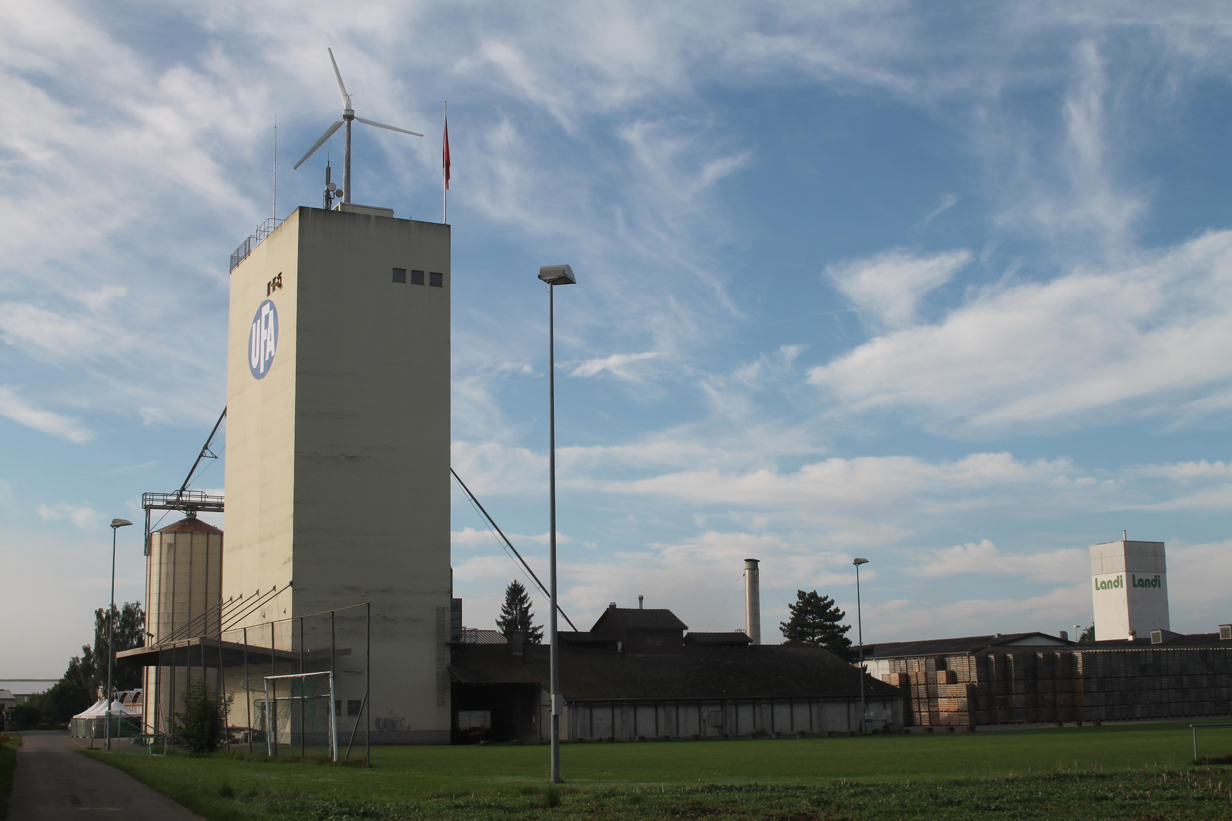 Silo Marthalen